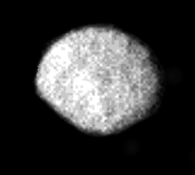 Lune neptunienne Larissa saisie par Voyager 2 le 24 août 1989 à une distance de 2,45 Gm Source : NASA/Goddard Space Flight Center